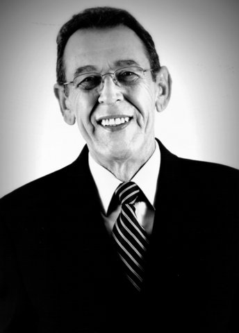 Leonel Paiva, 19/04/1944 - 08/01/2012